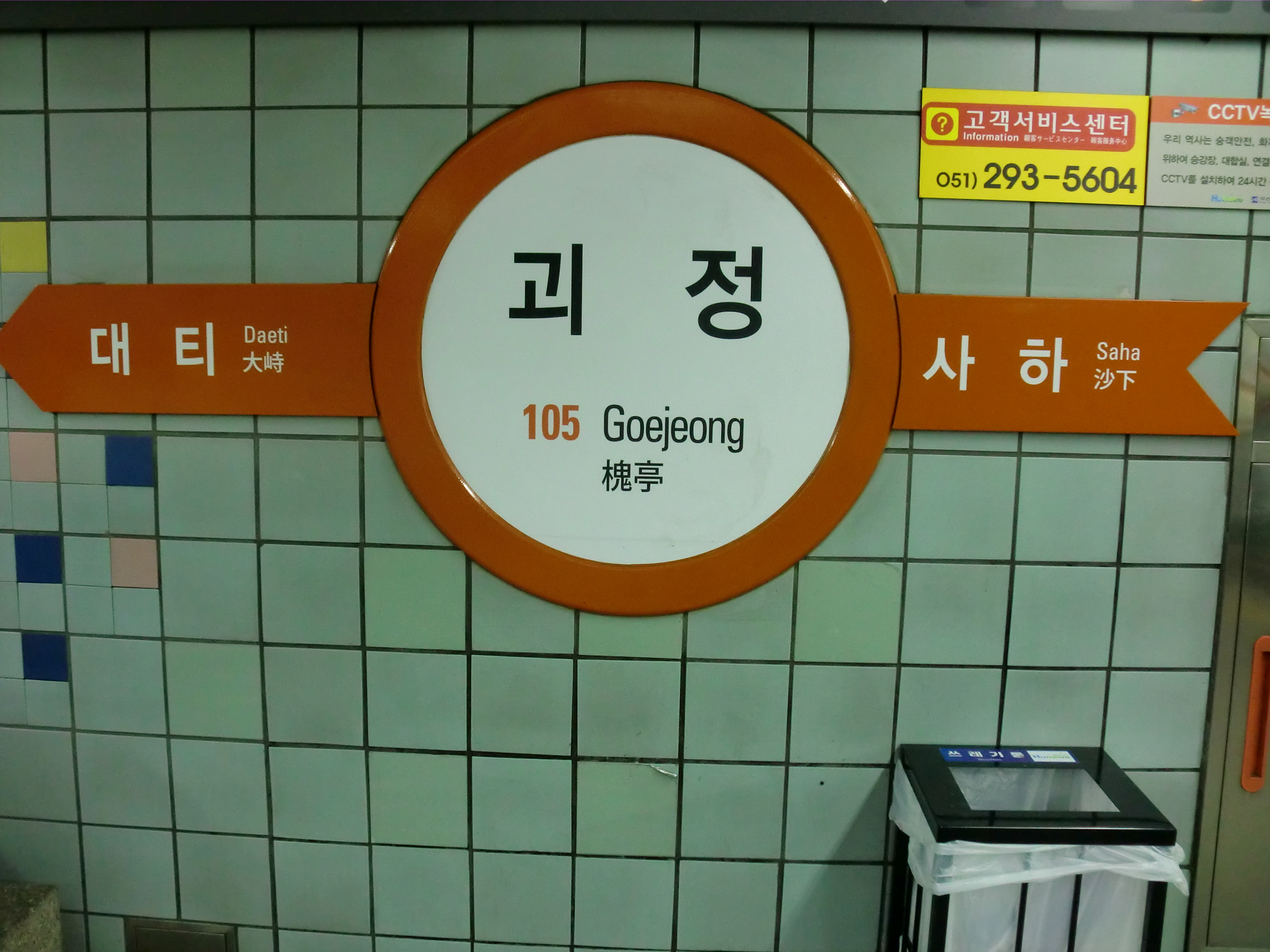 부산도시철도 1호선 괴정역의 역명판